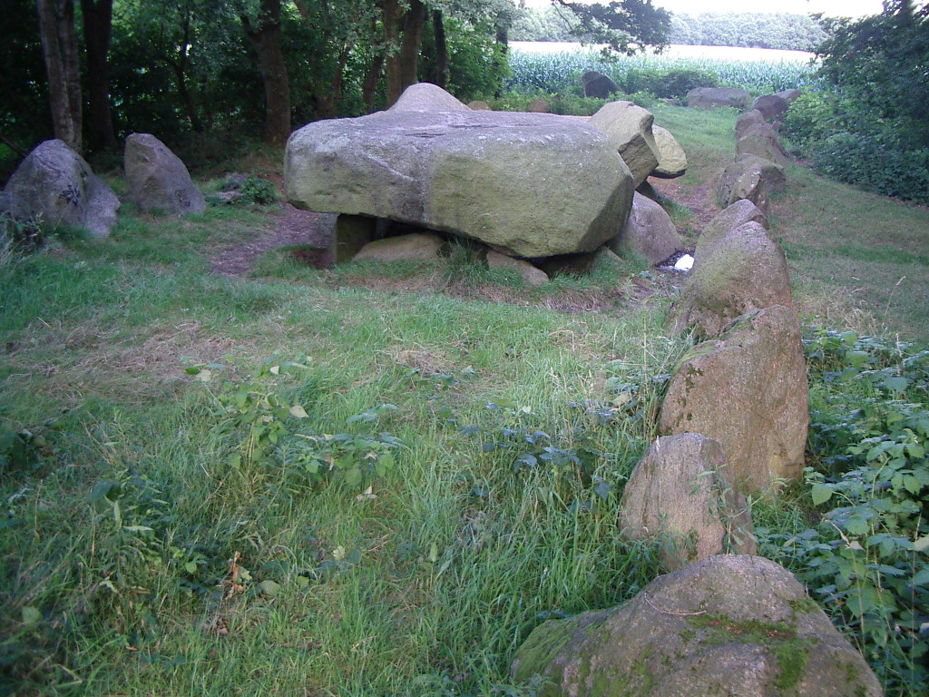 Das "Bülzenbett", ein Megalithgrab bei Sievern, Stadt Langen